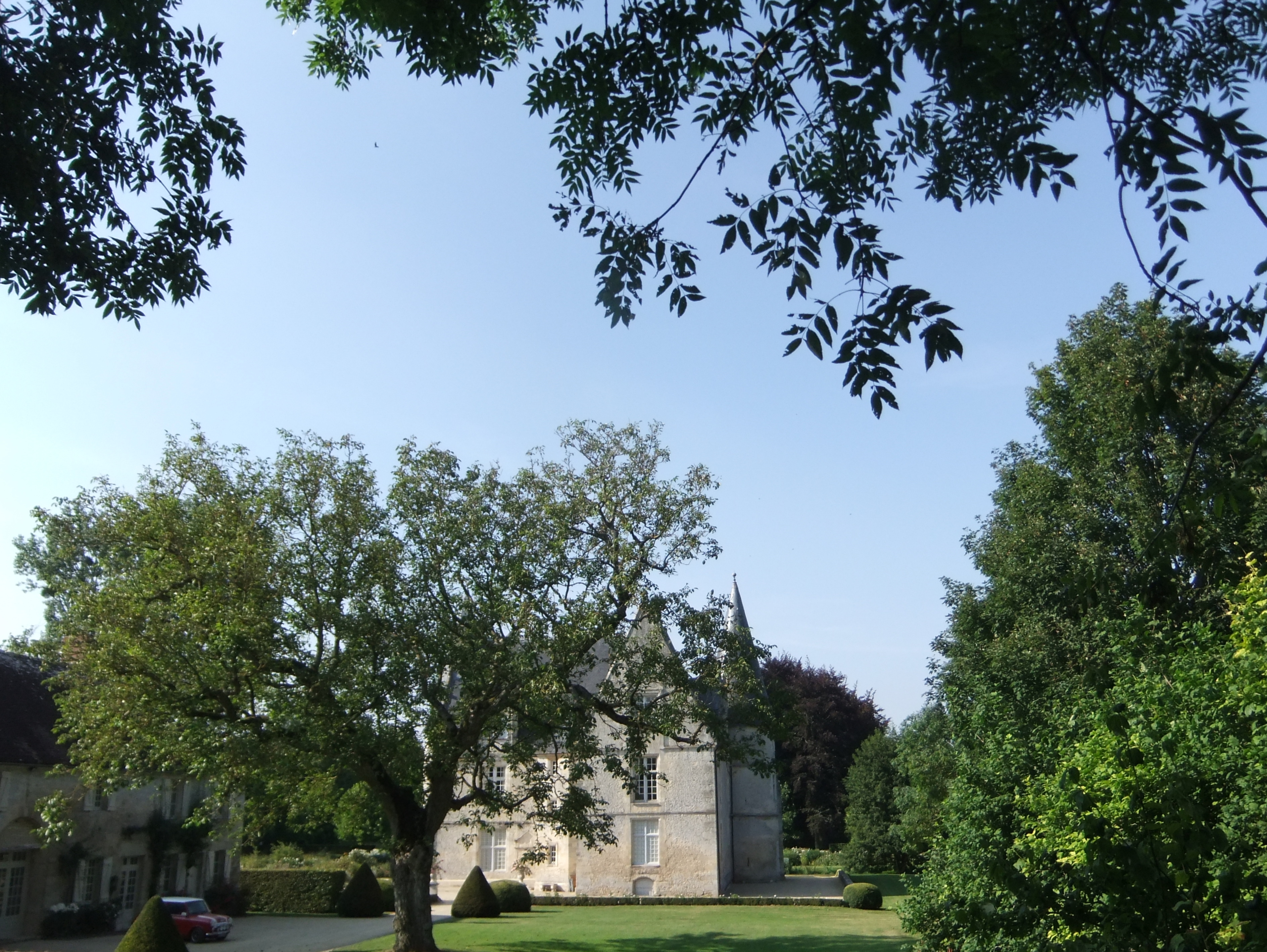 Manoir de Commeaux .